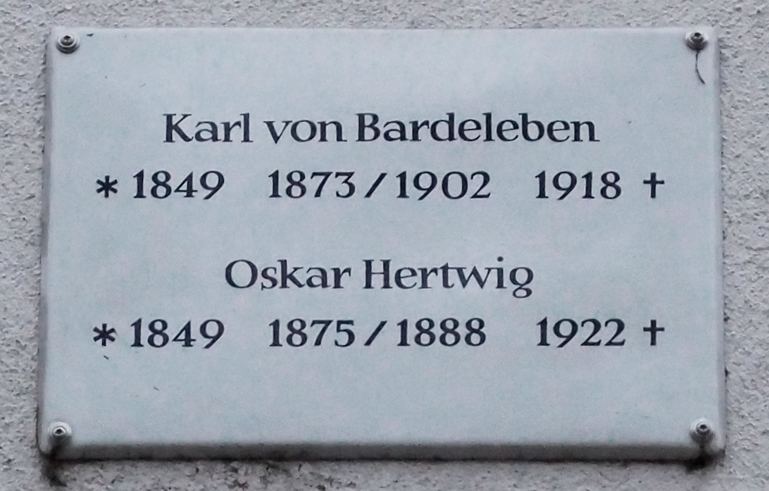 Tafel für den Anatomen Karl von Bardeleben (1849-1918) in Jena, Teichgraben 7